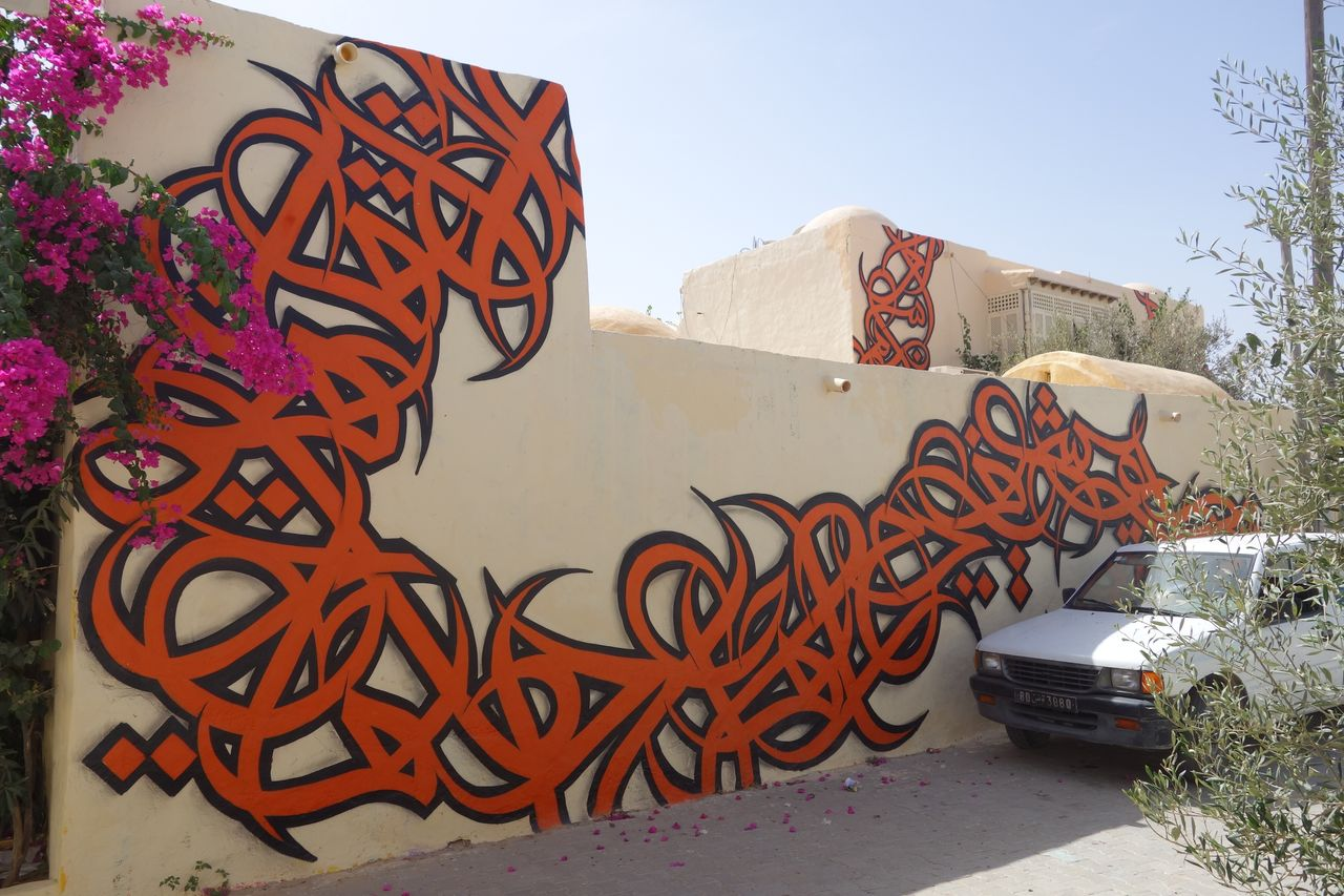 Tunisia Dejrba street art, Er Riadh area